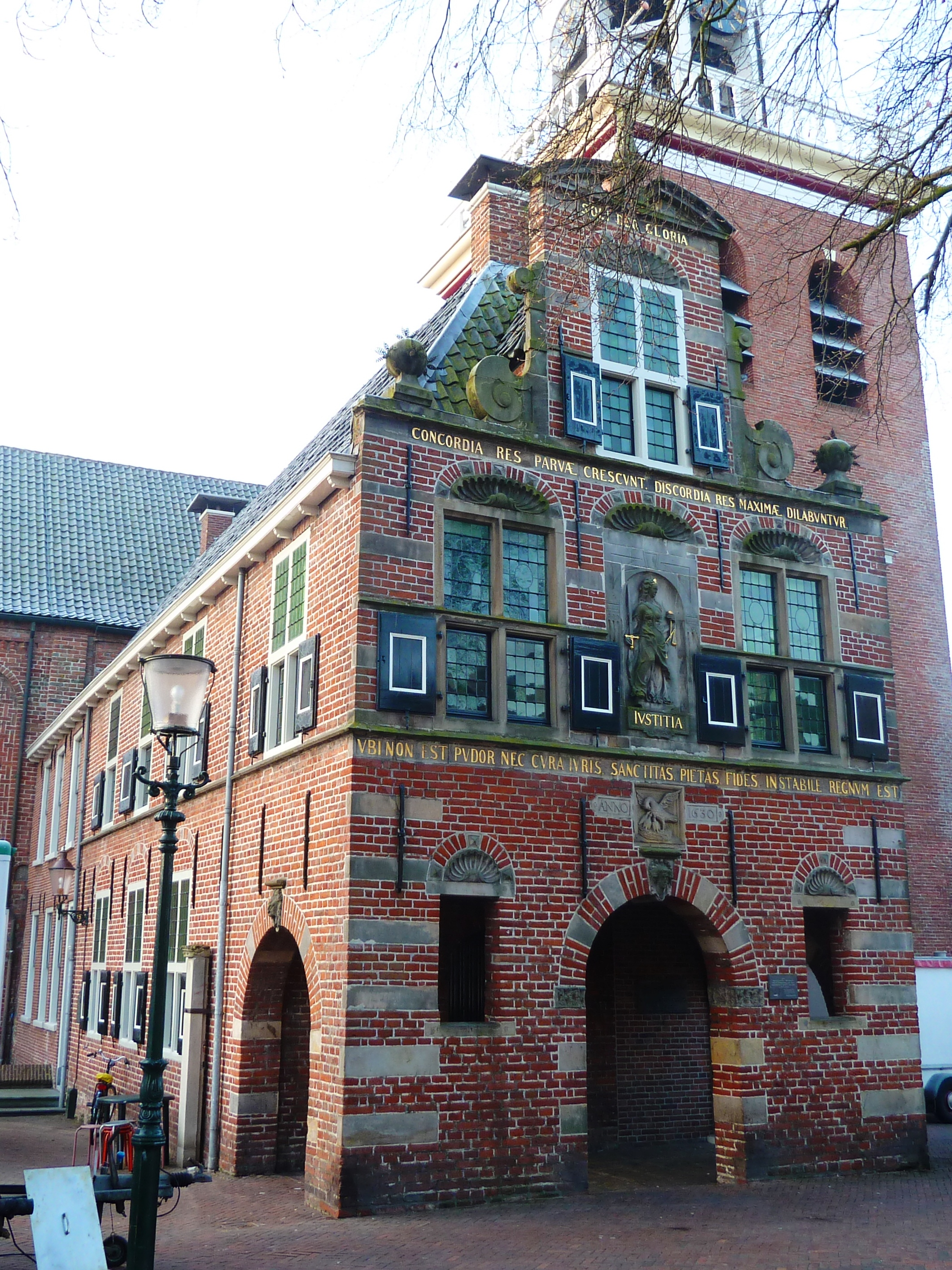 Raadhuis van Appingedam (1638) aan de Wijkstraat 36 in Appingedam.